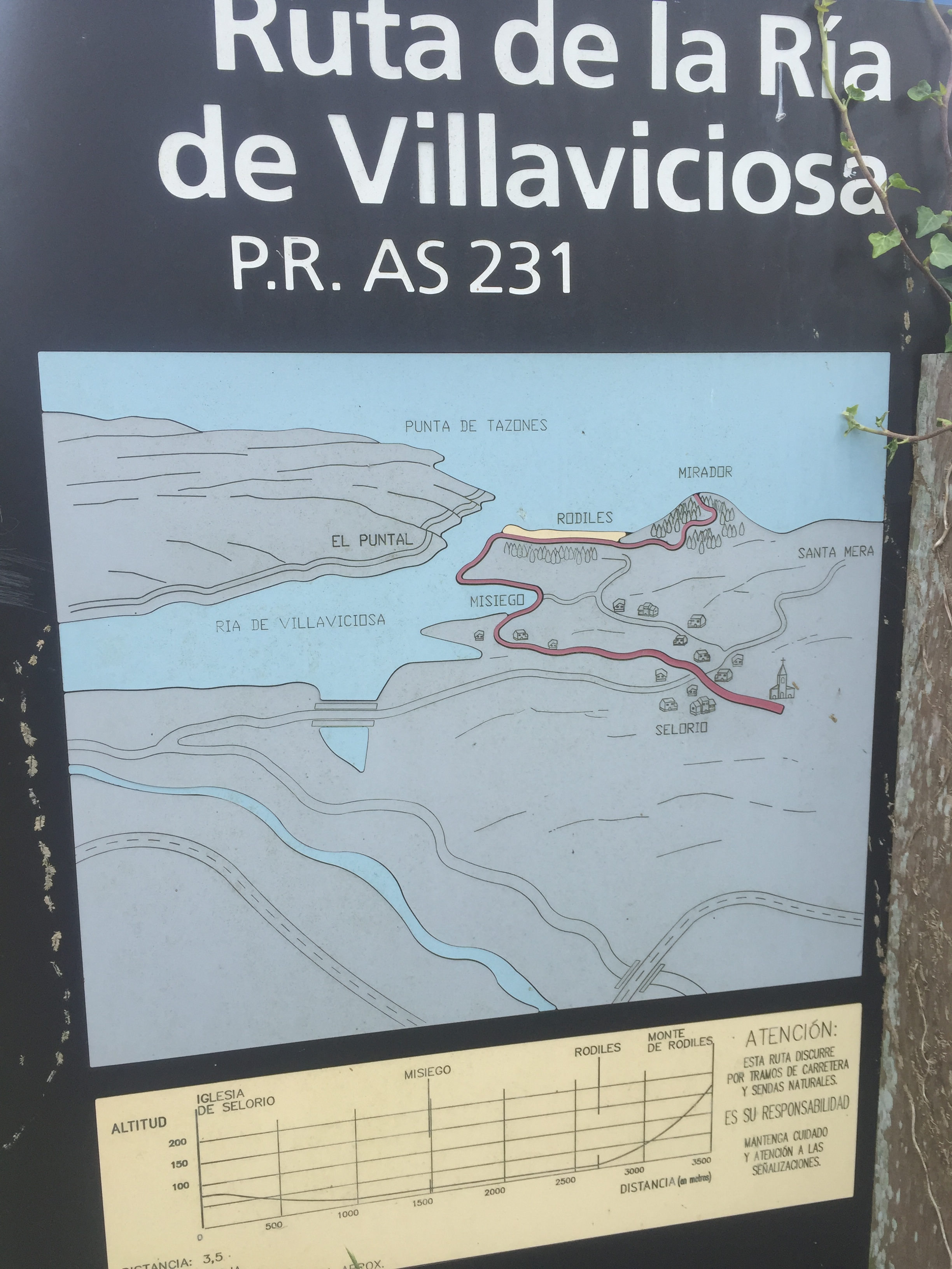 Cartel en Selorio.